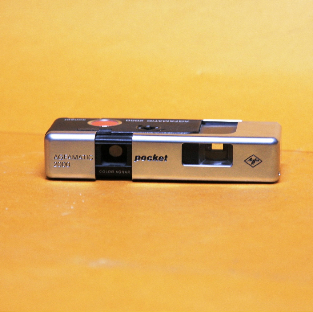 Coll. Marcè CL - Agfa matic 2000 poket 1973